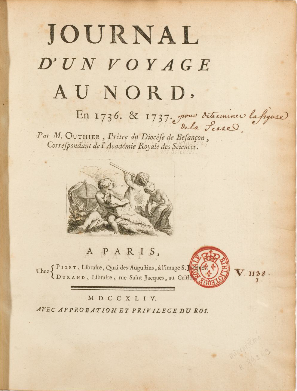 Journal d'un voyage au Nord